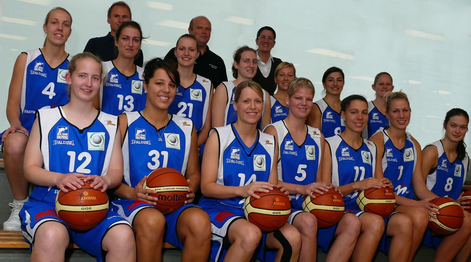 BC Marburg, team 2008 der 1. Damen Basketball Bundesliga